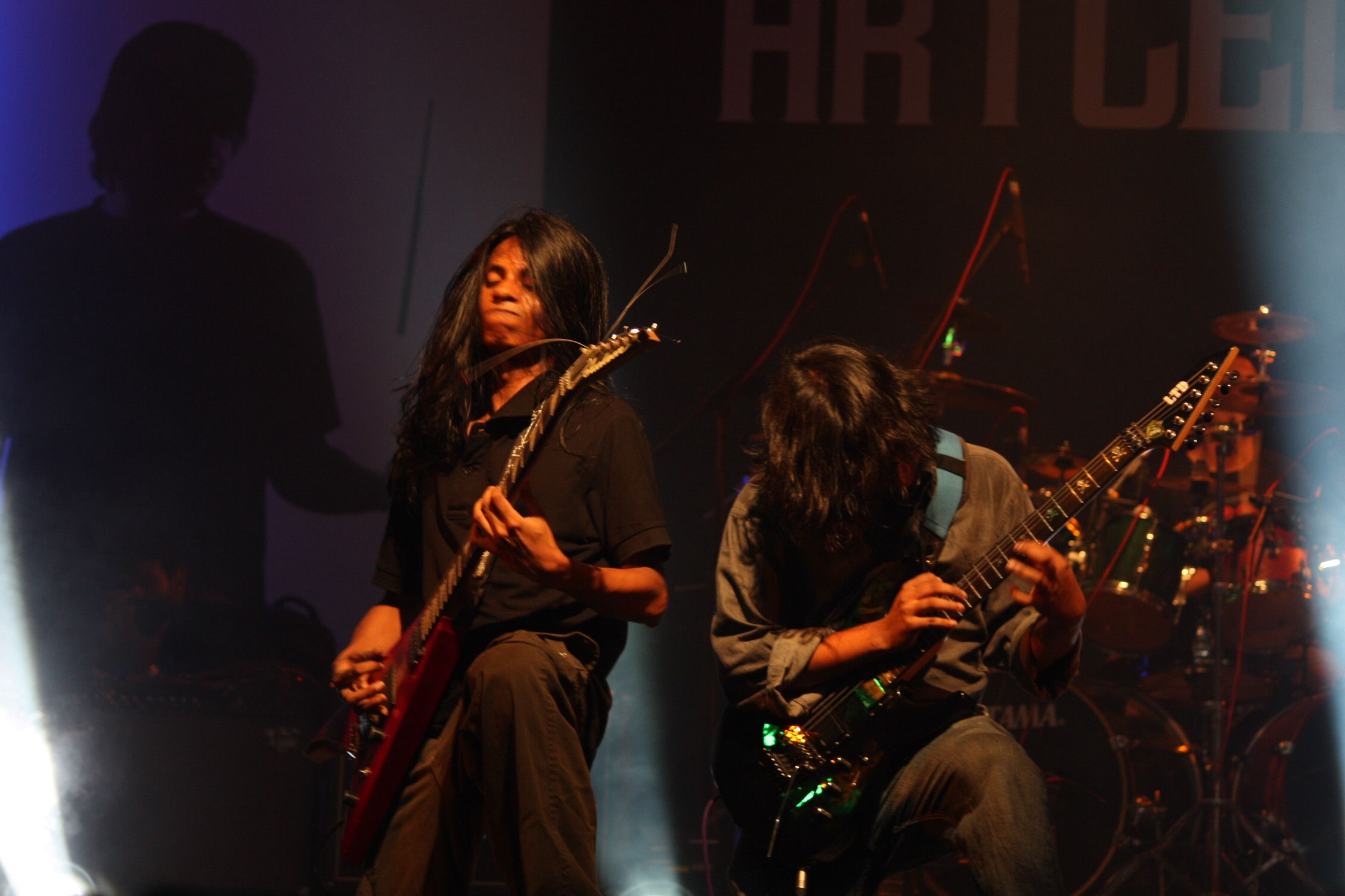 Powersurge